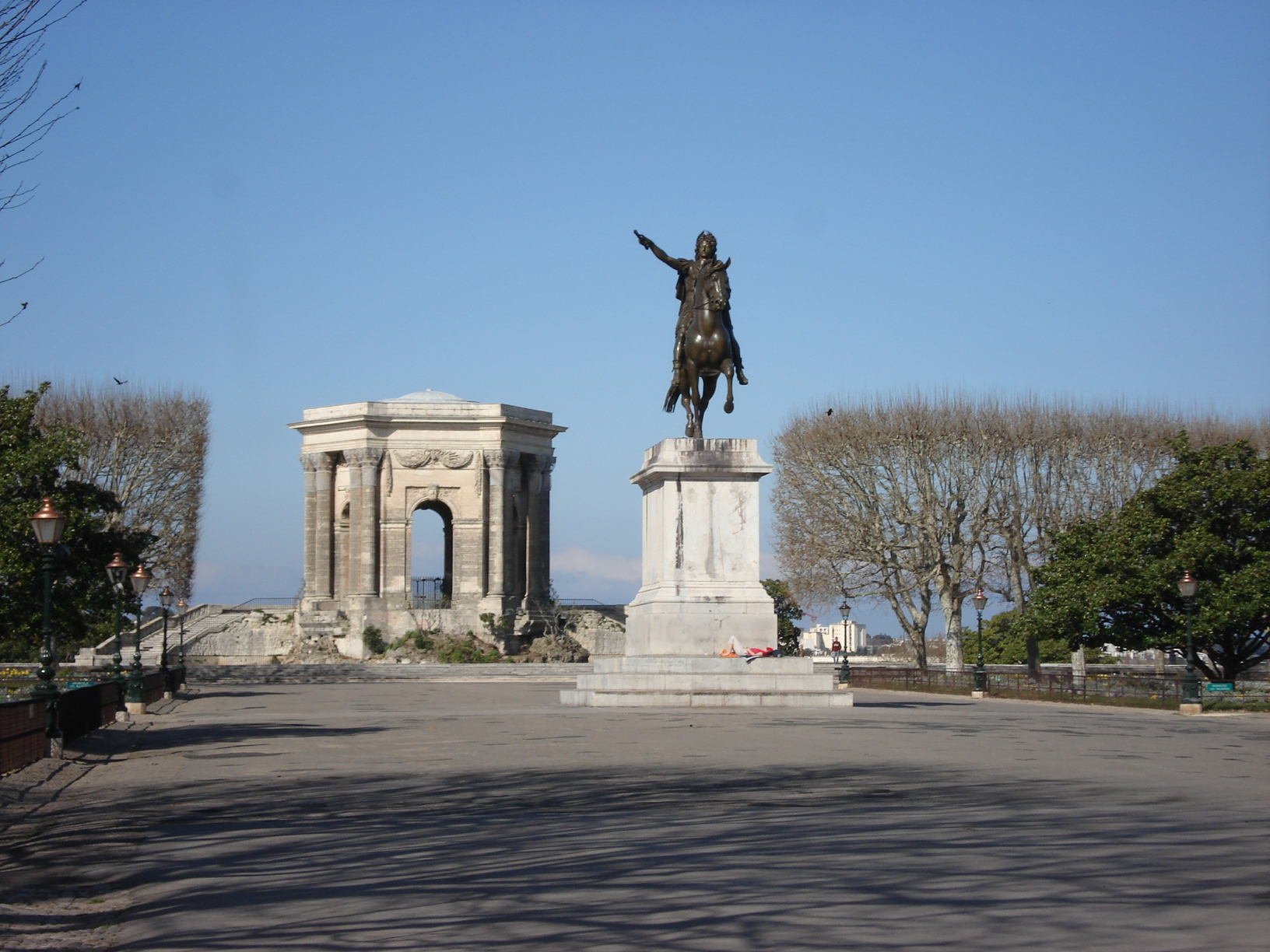 Montpellier (Hérault) - le Peyrou et statue équestre de Louis XIV.